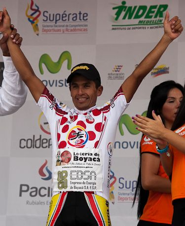 Fernando Camargo, campeón de la montaña, Vuelta a Colombia 2012